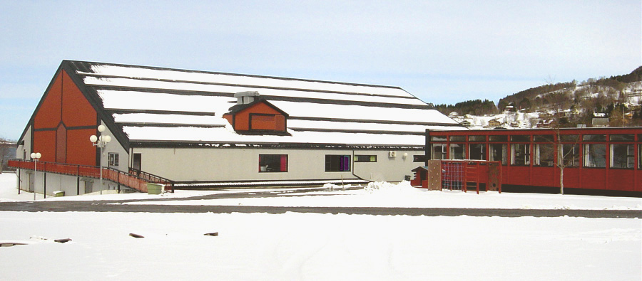 Gjemneshallen, Gjemnes